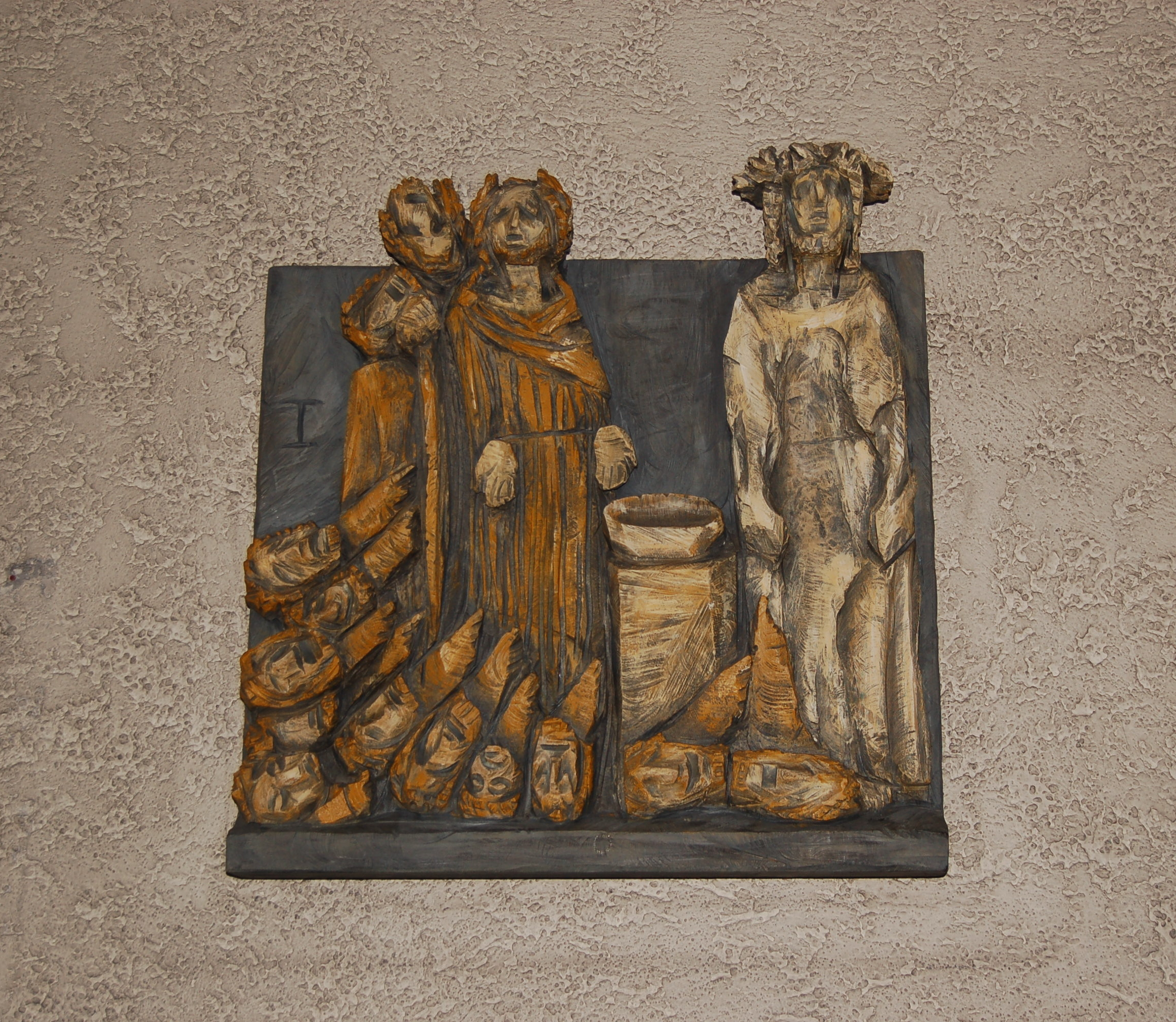 Debanter Pfarrkirche, 1. Station by Lois Fasching aus Dölsach/Gödnach (2003/2004)